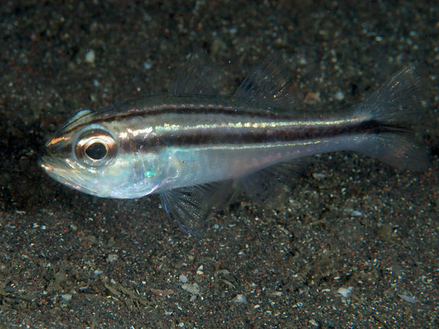 テッポウイシモチ Apogon kiensis